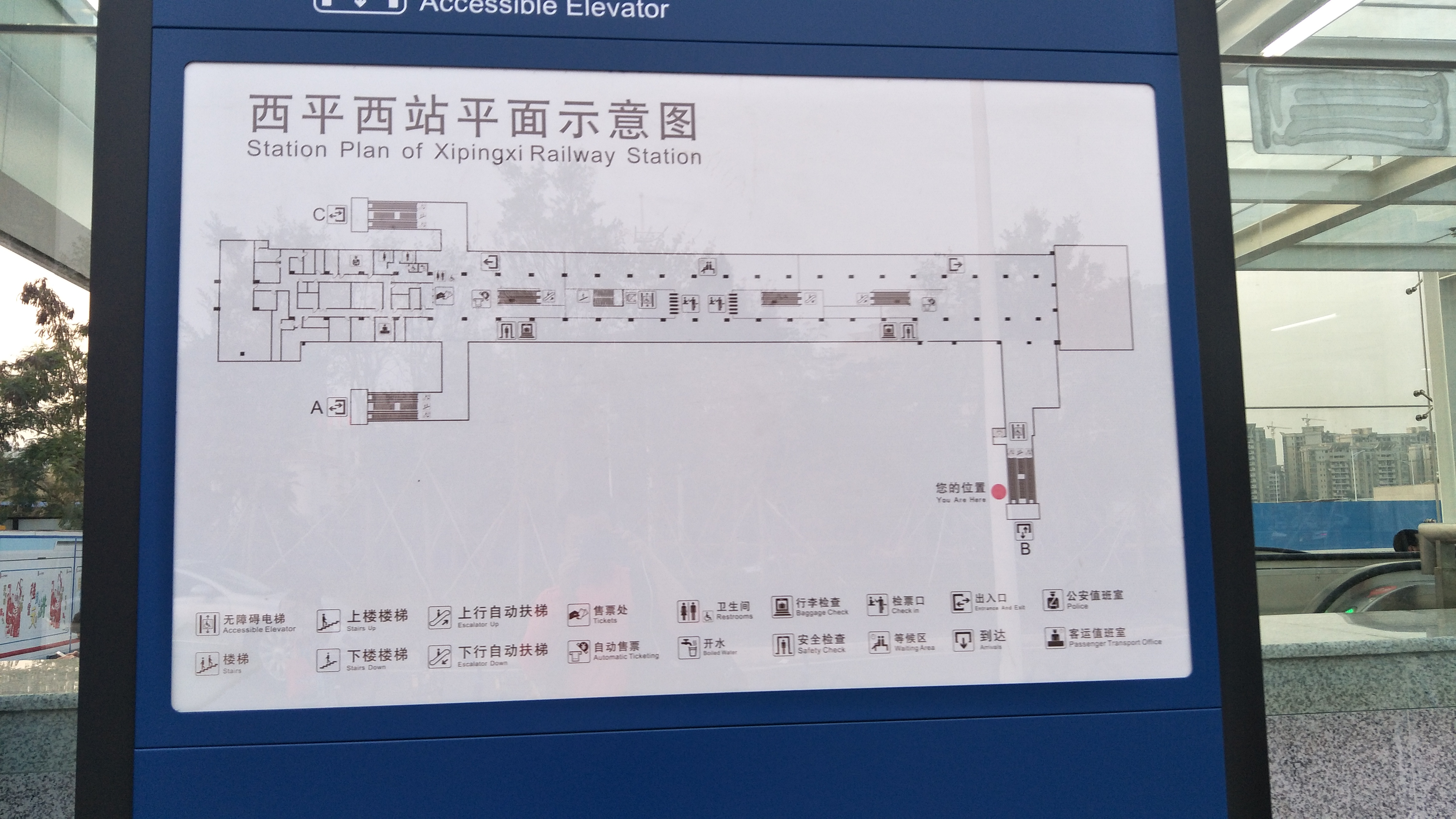 西平西站平面图